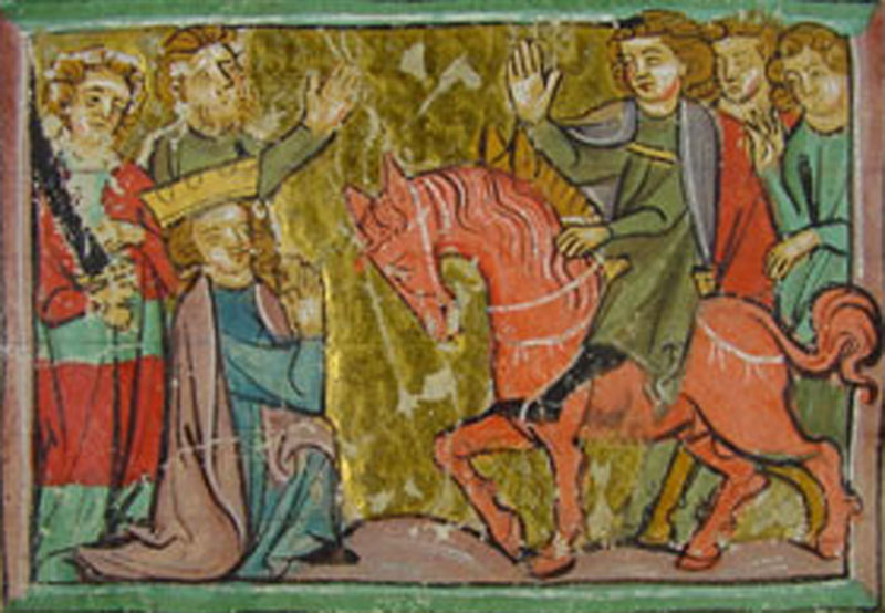 Fußfall Kaiser Friedrich Barbarossas vor Heinrich dem Löwen